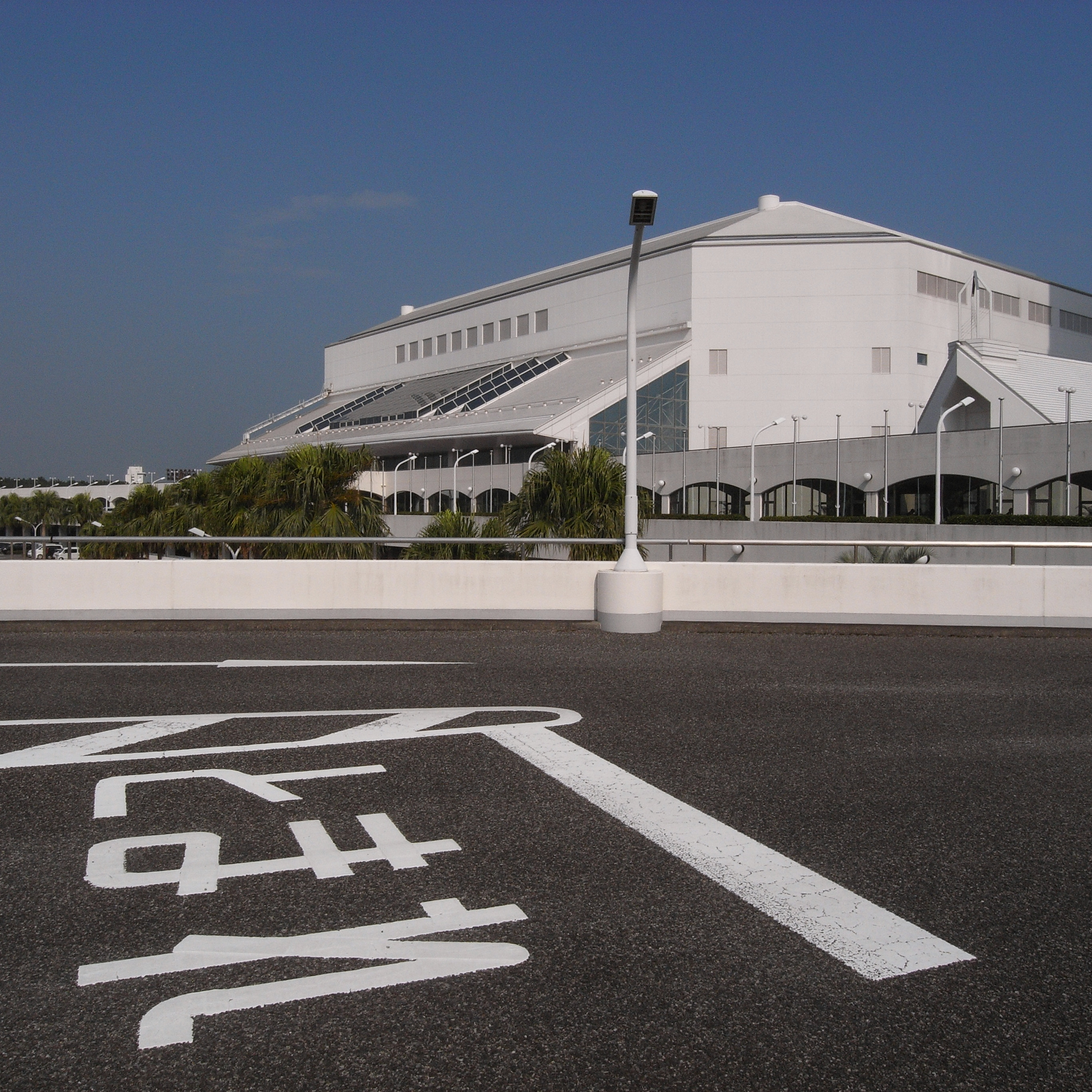 シーガイアコンベンションセンター。